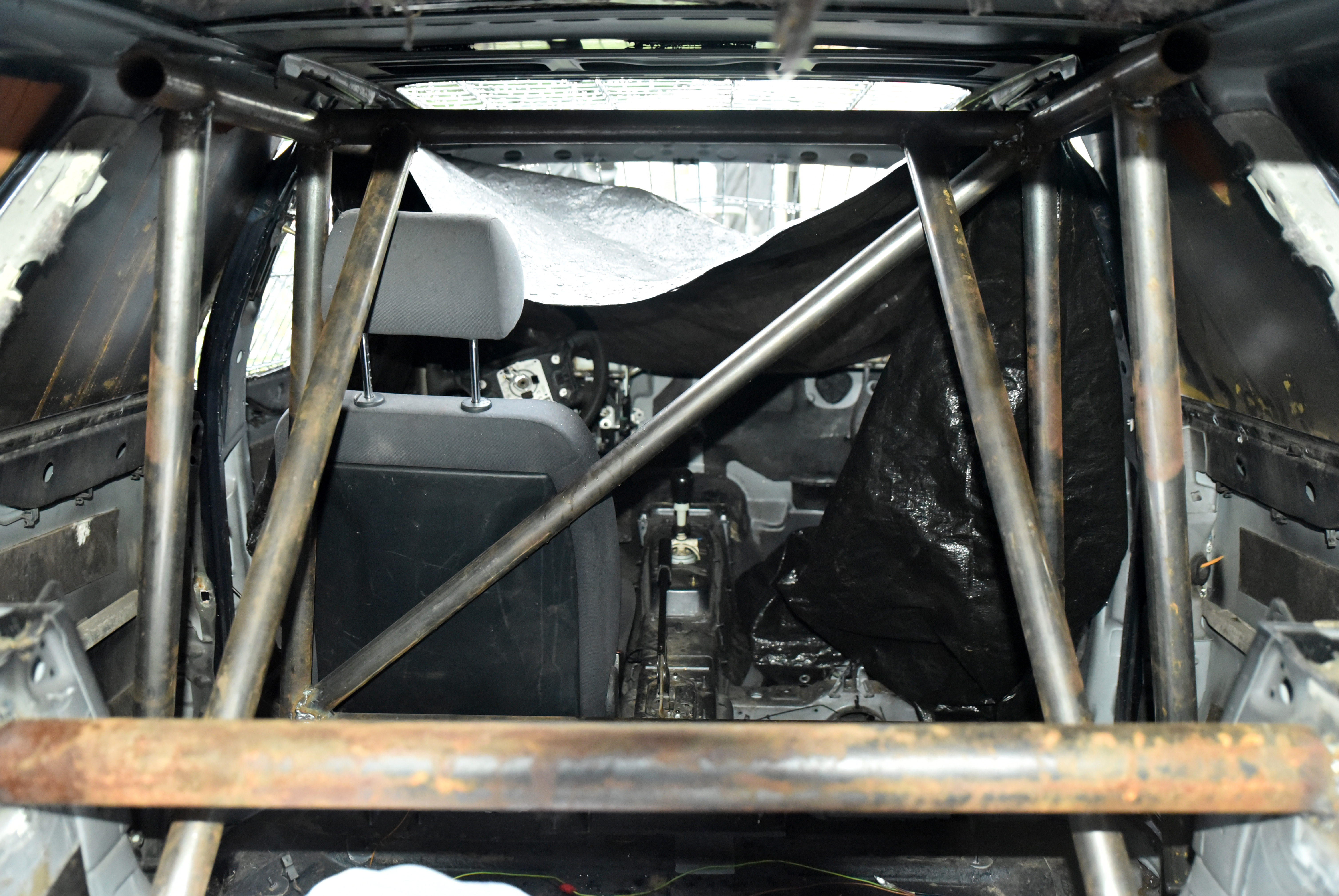 Stock Car beim Langeln Open Air 2016